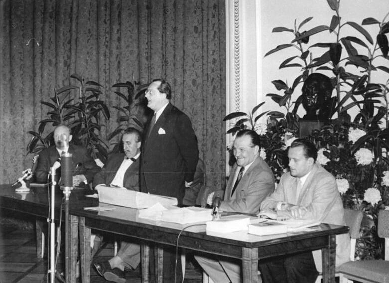 Zentralbild Sturm 10.8.1955 Pressekonferenz in der Deutschen Staatsoper Berlin-Eine von der in- und ausländischen Presse stark besuchte Pressekonferenz vor Beginn der Spielzeit 1955/56 im neuen Haus Unter den Linden, führte die Intendanz der Deutschen Staatsoper am 10.8.1955 im Orchesterprobenraum des Verwaltungsgebäudes durch. Intendant Burghardt, die Architekten des Wiederaufbaus und der Chefdramaturg unterrichteten die Pressevertreter. UBz: Die Leiter der Pressekonferenz (von links nach rechts): Der Architekt für die technische Ausgestaltung des Hauses, Professor Hämmerling; der Oberspielleiter Erich-Alexander Winds; Nationalpreisträger Max Burghardt, Intendant (stehend); Nationalpreisträger Professor Paulick, Architekt des Wiederausbaus, und der Chefdramaturg, Herr Otto.